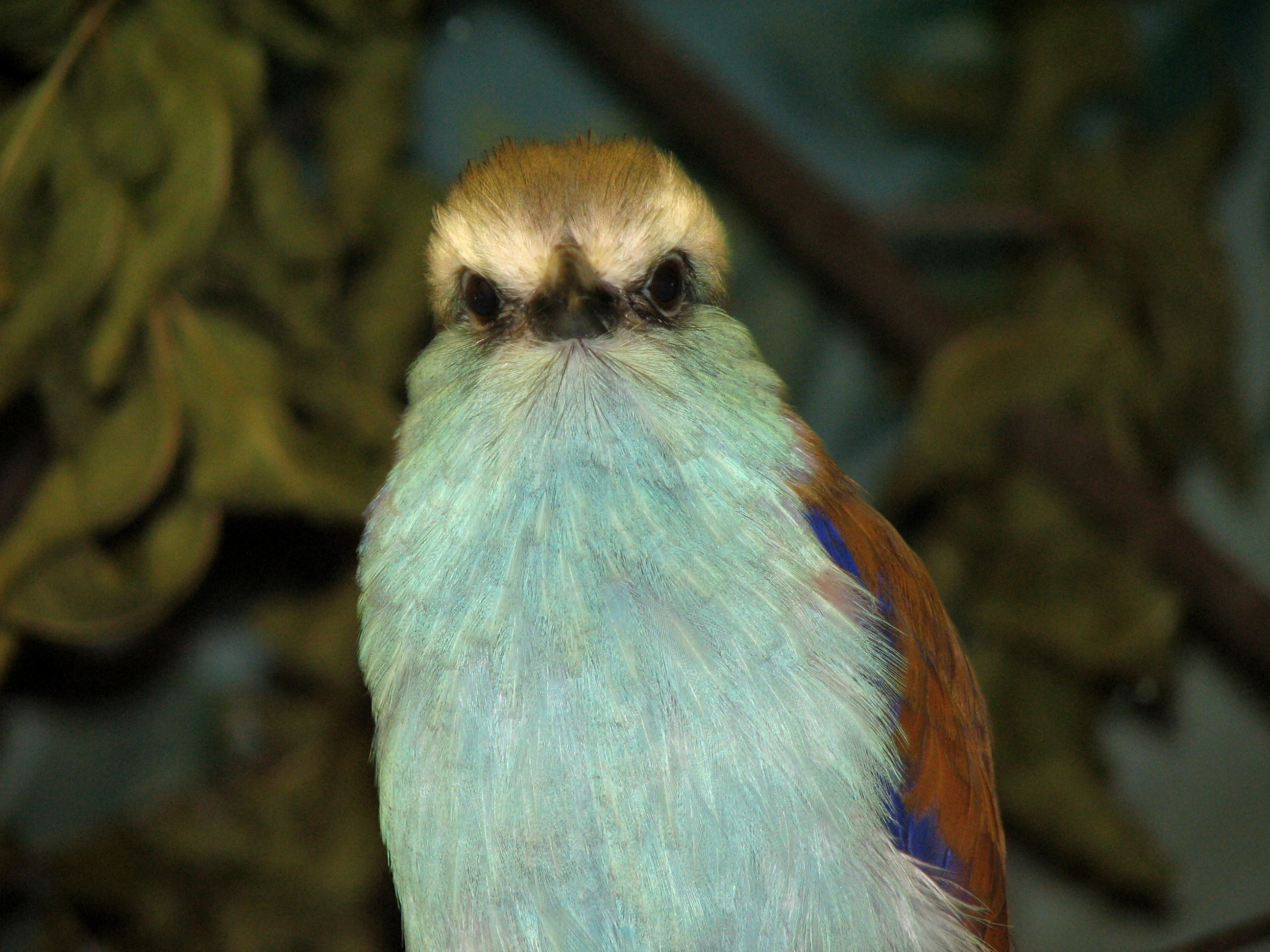 Racquet-tailed Roller (Coracias spatulatus en )